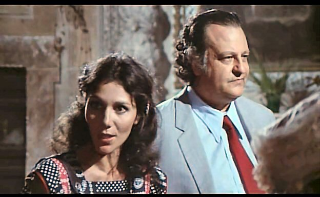 Screenshot dal film Furto di sera bel colpo si spera (1974)